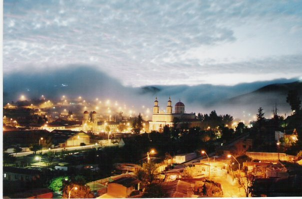 Andacollo Paisaje